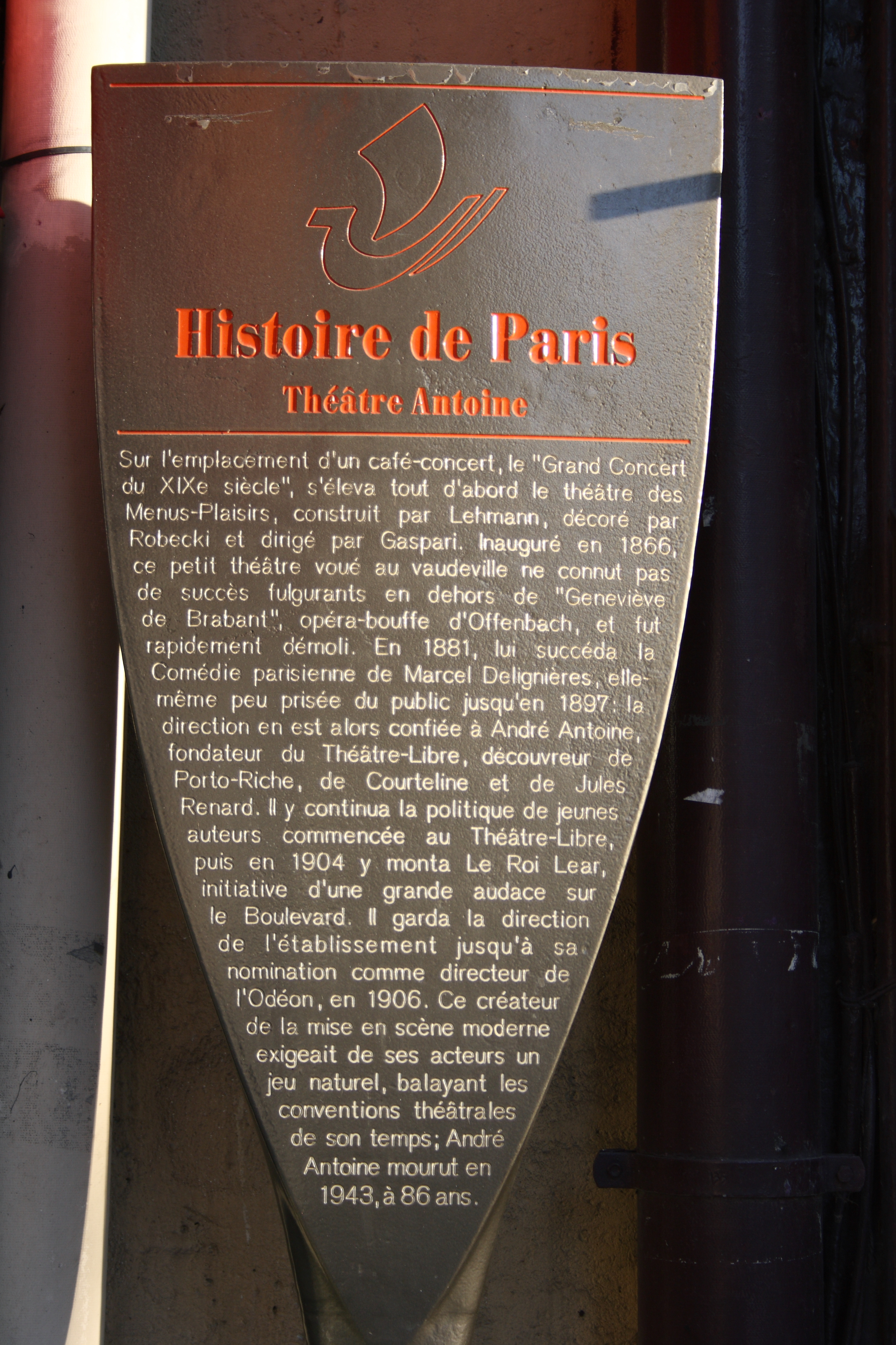 Erklärungstafel zum Théâtre Antoine, 14, Boulevard de Strasbourg im 10. Arrondissement von Paris